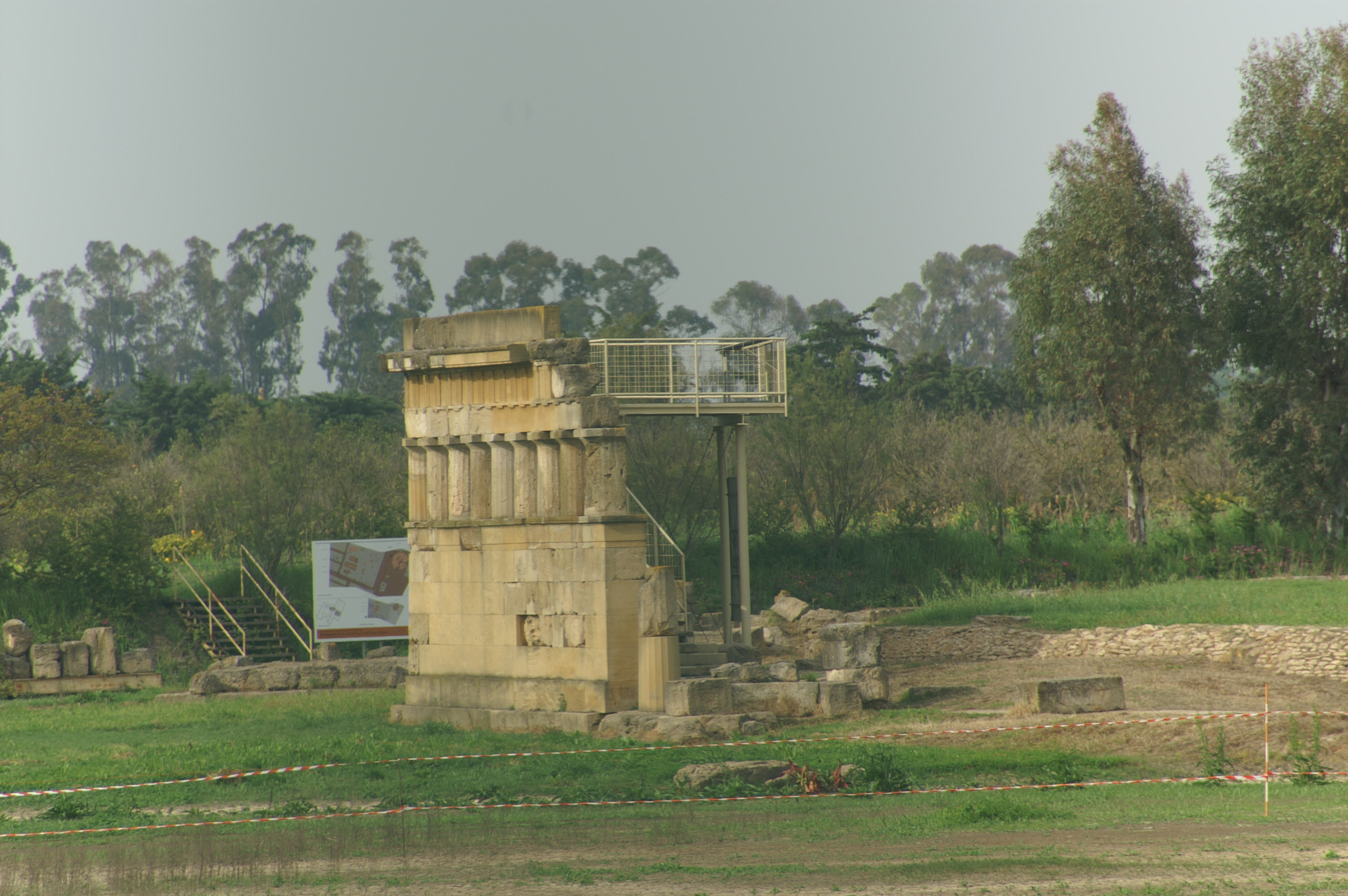 Metaponto Theater: rekonstr. Fassade